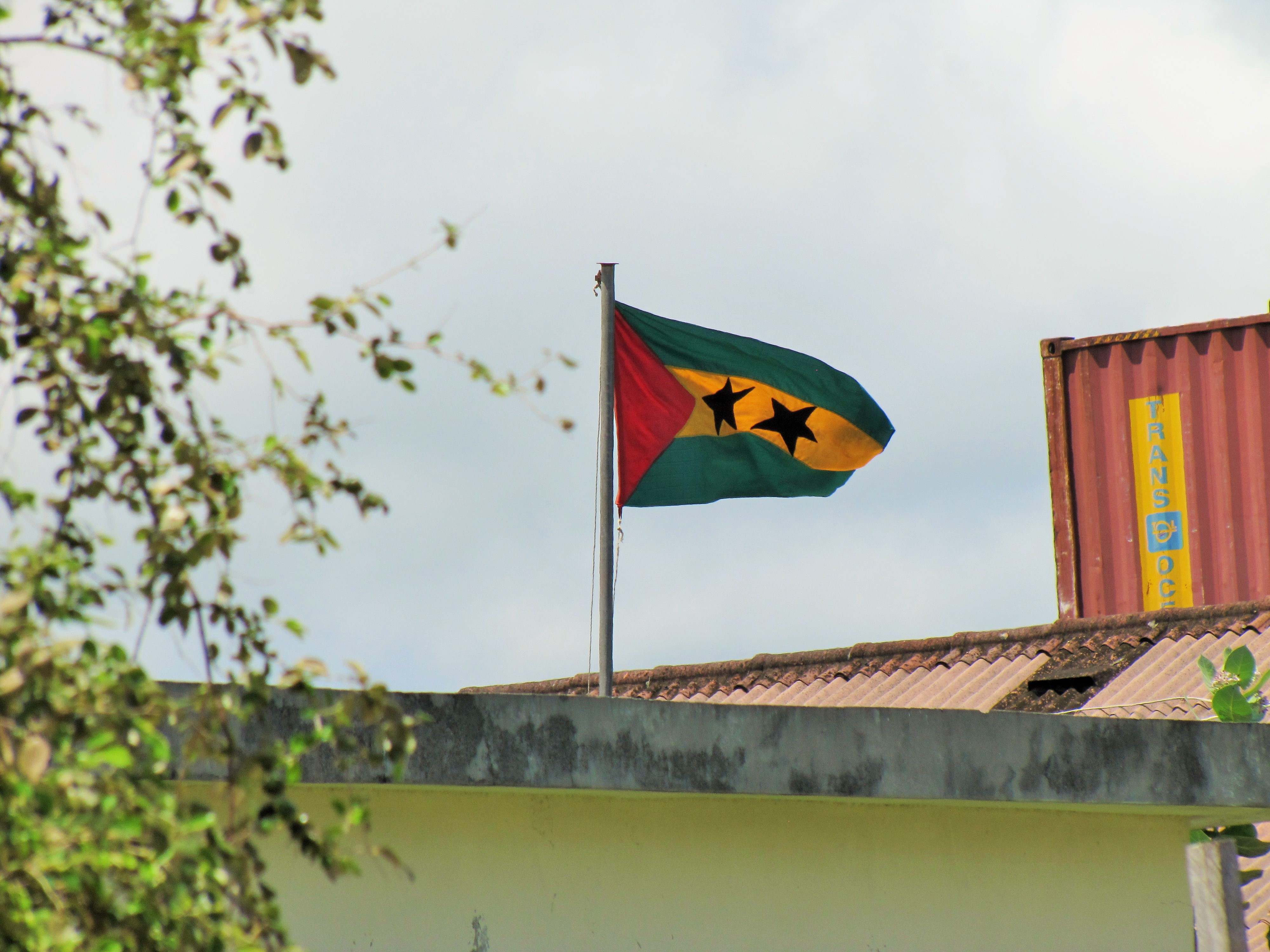 Sao Tome Flag 2